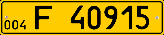 Автомобильный номер представителей иностранных компаний и СМИ на Украине, 1997-2001 годы